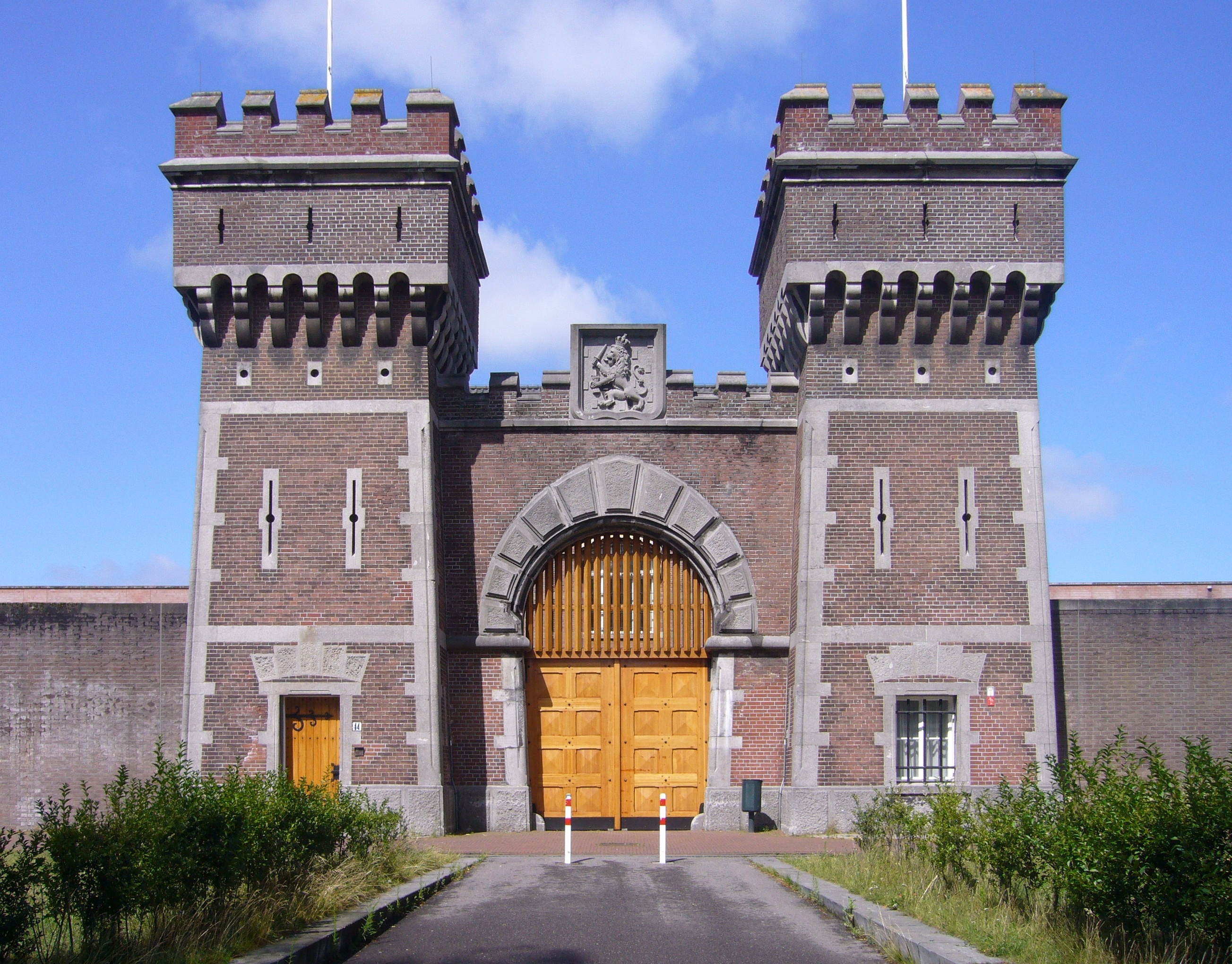 Oranjehotel Scheveningen, oude ingang